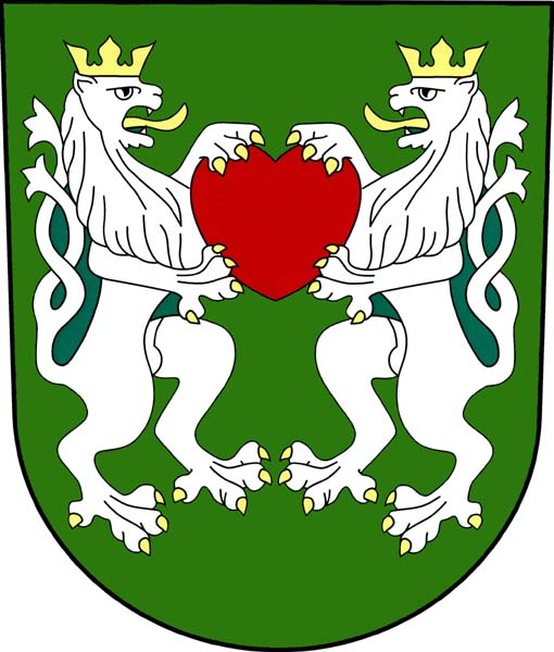 Znak obce Skalička v okrese Brno-venkov